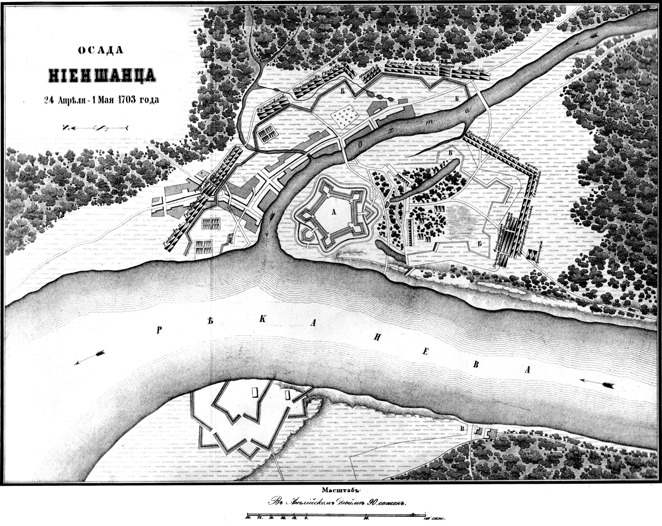 Карта осады Ниеншанца 1703 год